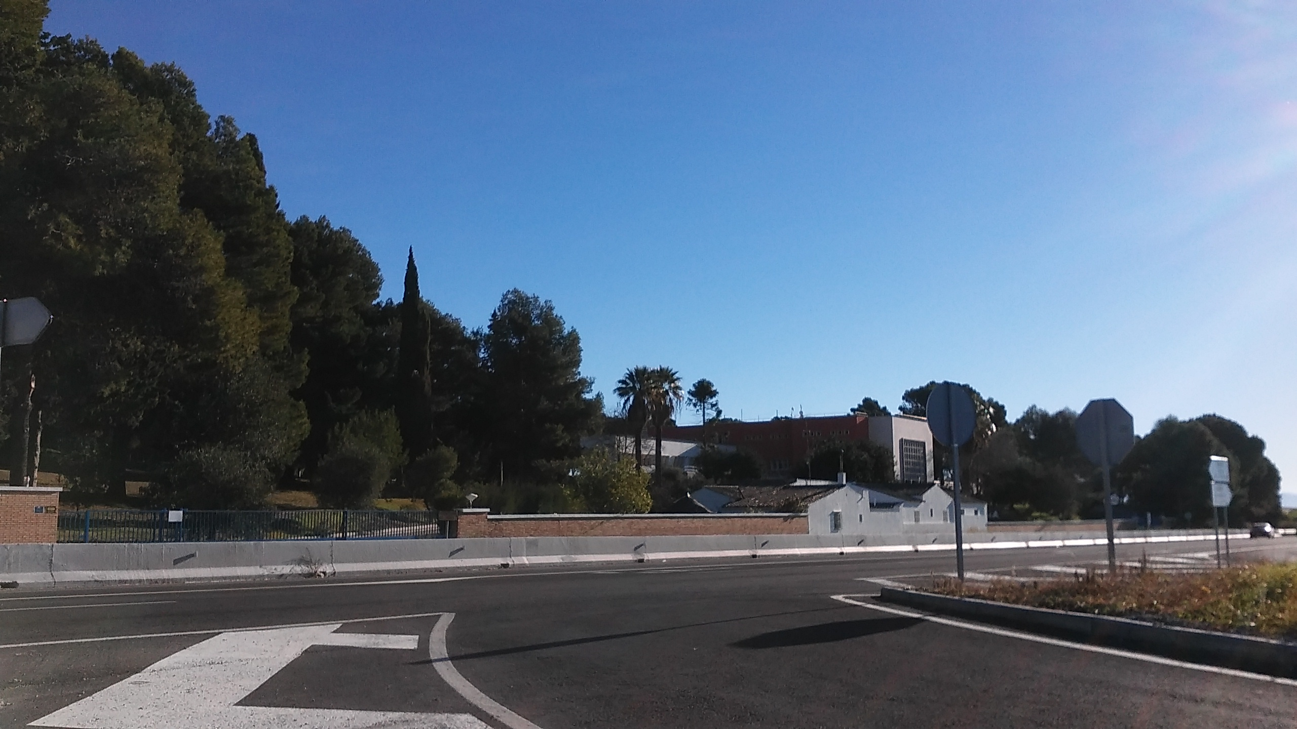 Centro del agua en Cuartillos, Jerez de la Frontera